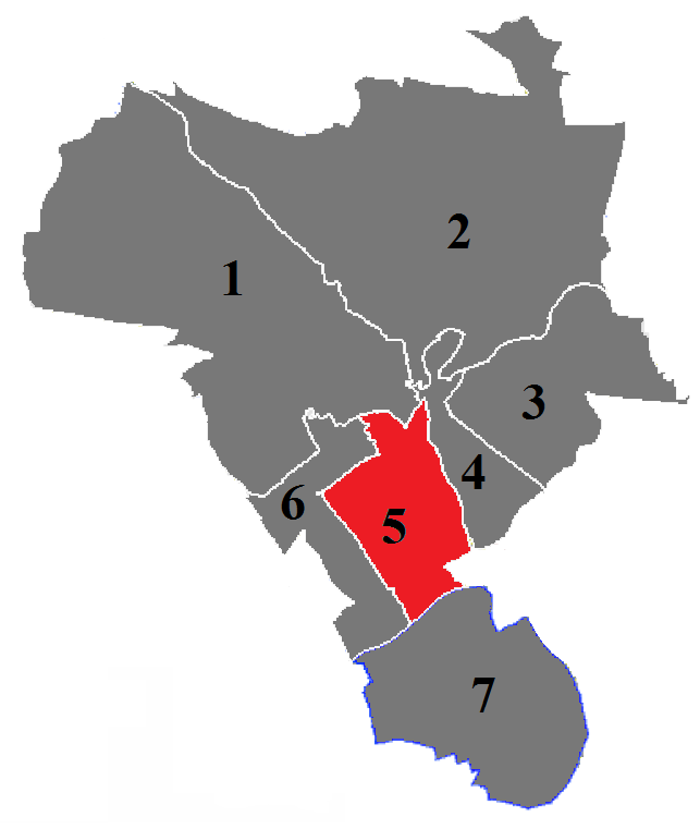 Situation du canton dans la ville de Nîmes